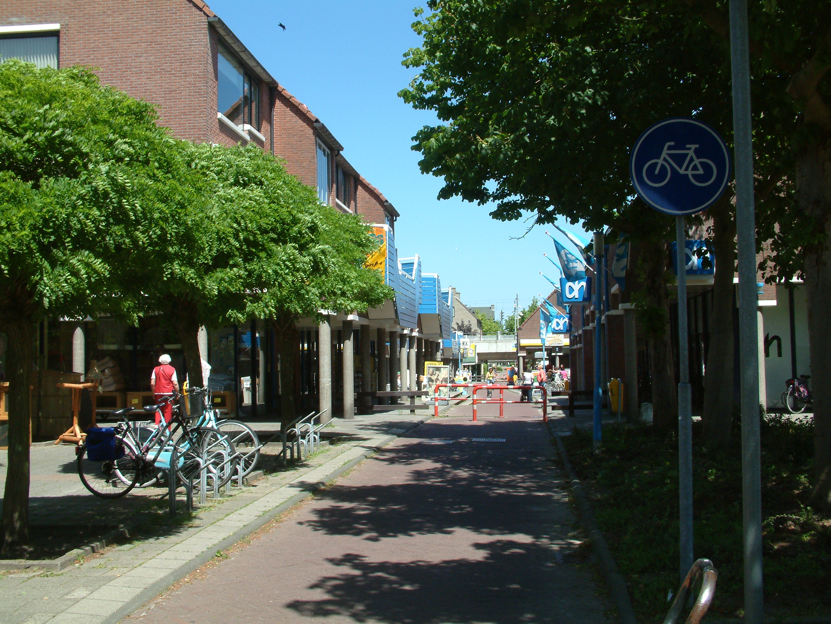 Bouwwerk in Zoetermeer